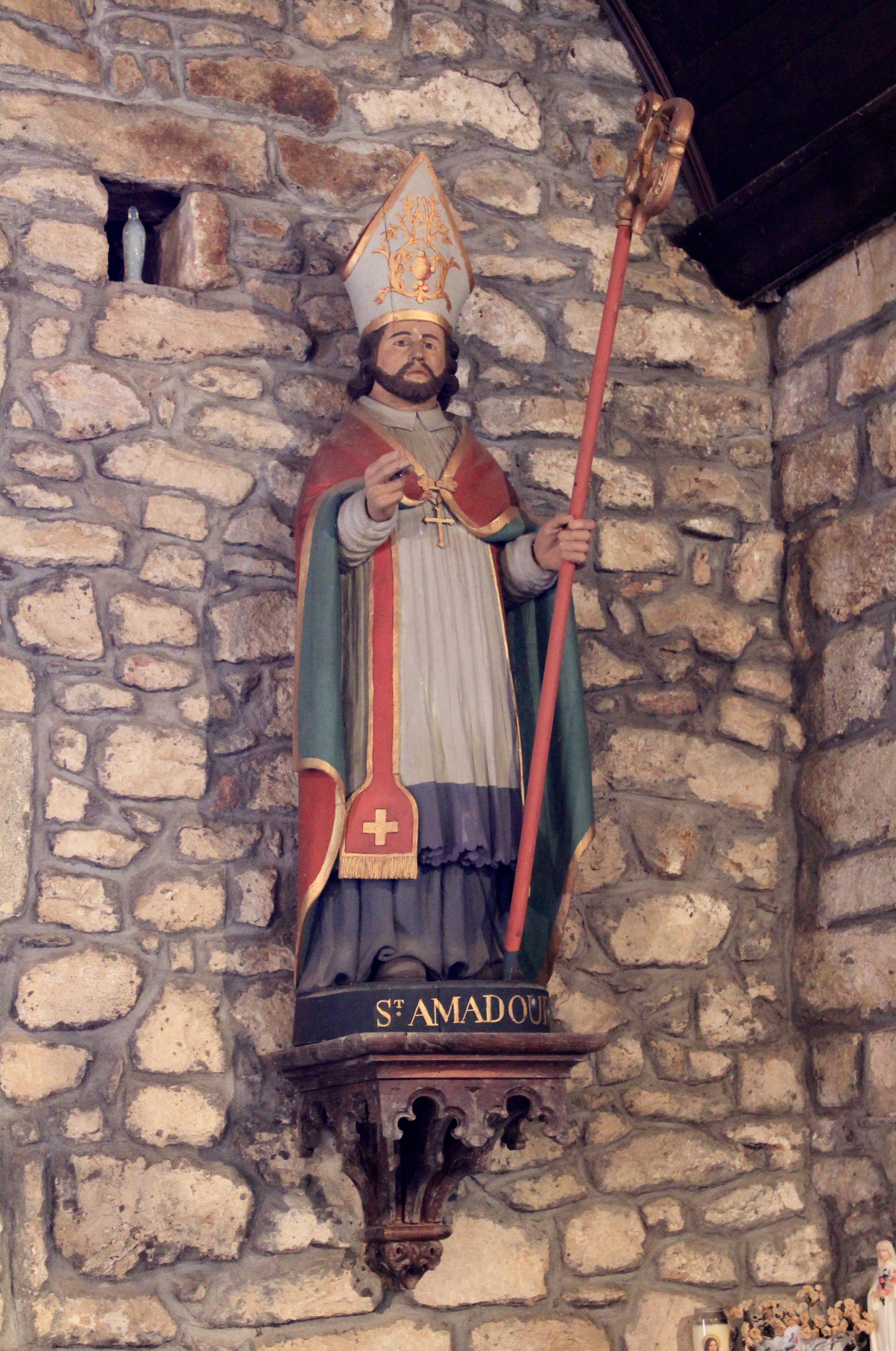 Chapelle Notre-Dame-de-la-Clarté à Locadour, Kervignac, France. Statue Saint-Amadour.